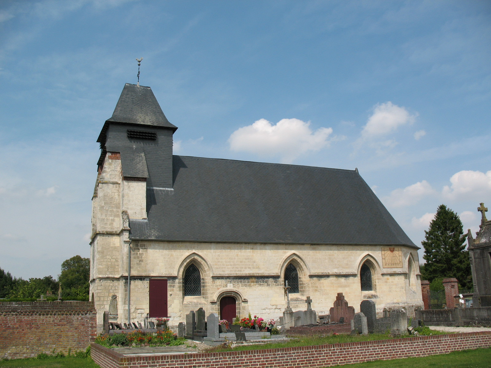 L'église Saint-Martin de Béhencourt est un édifice flamboyant datant de la fin du XVIe siècle.